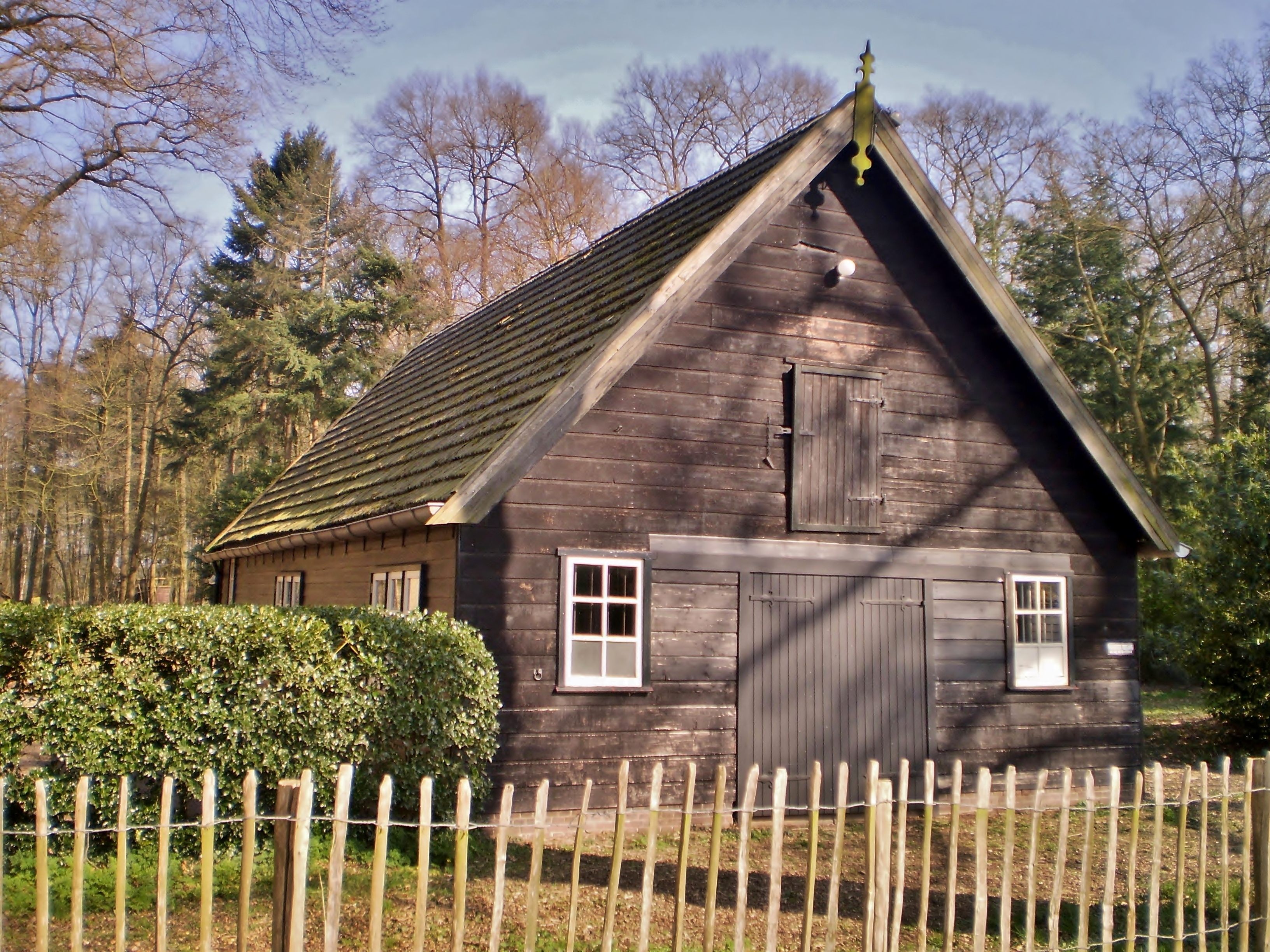 Biltseweg 31